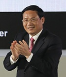 浙江省省长李强出席一项颁奖活动，2016年5月11日。